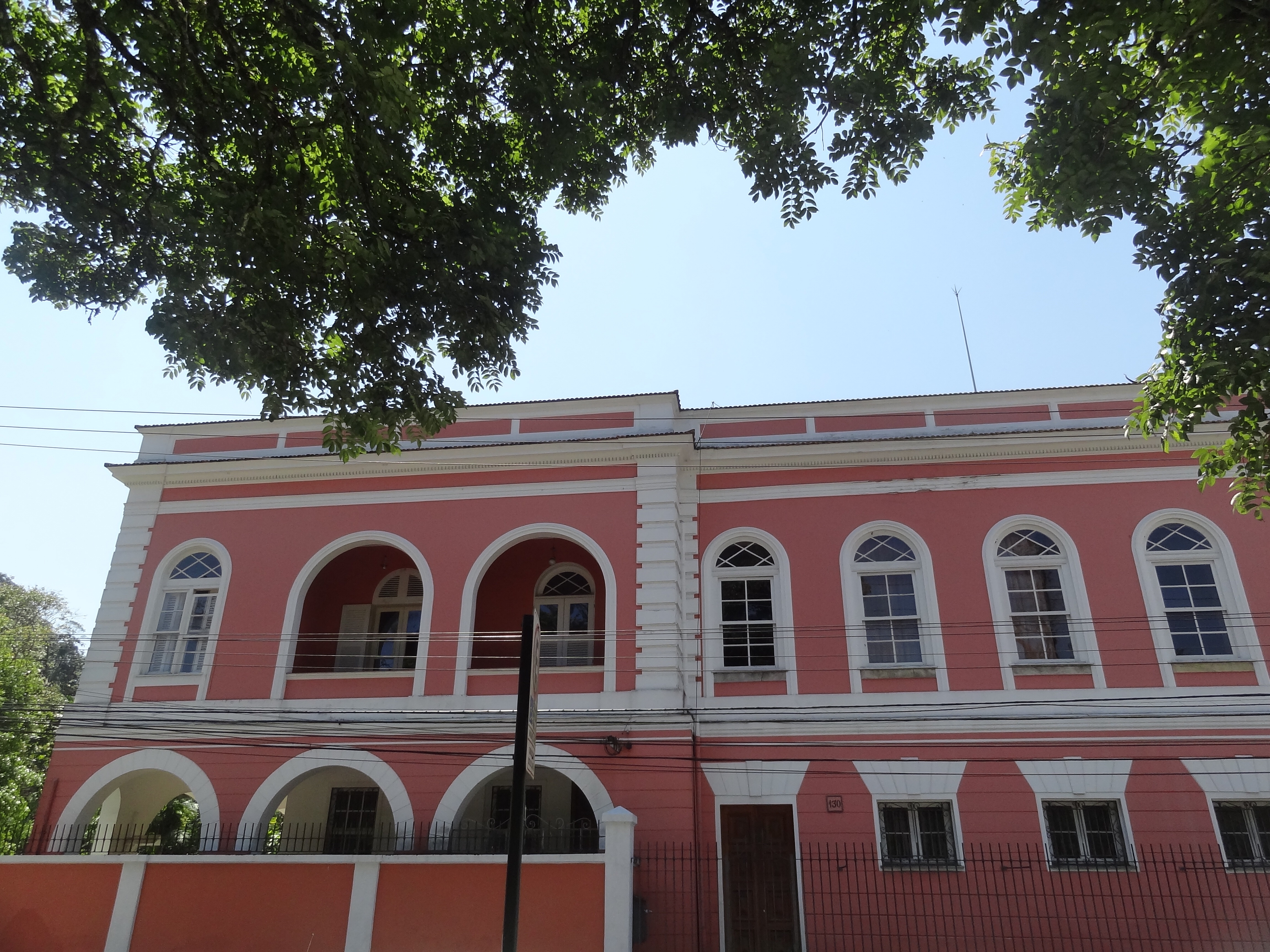 Casa: Dr. Joaquim Moreira (rua), 130; Palácio Grão Pará